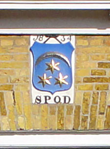 Gevelsteen Zuiderbolwerk 51 Dokkum, rijksmonument